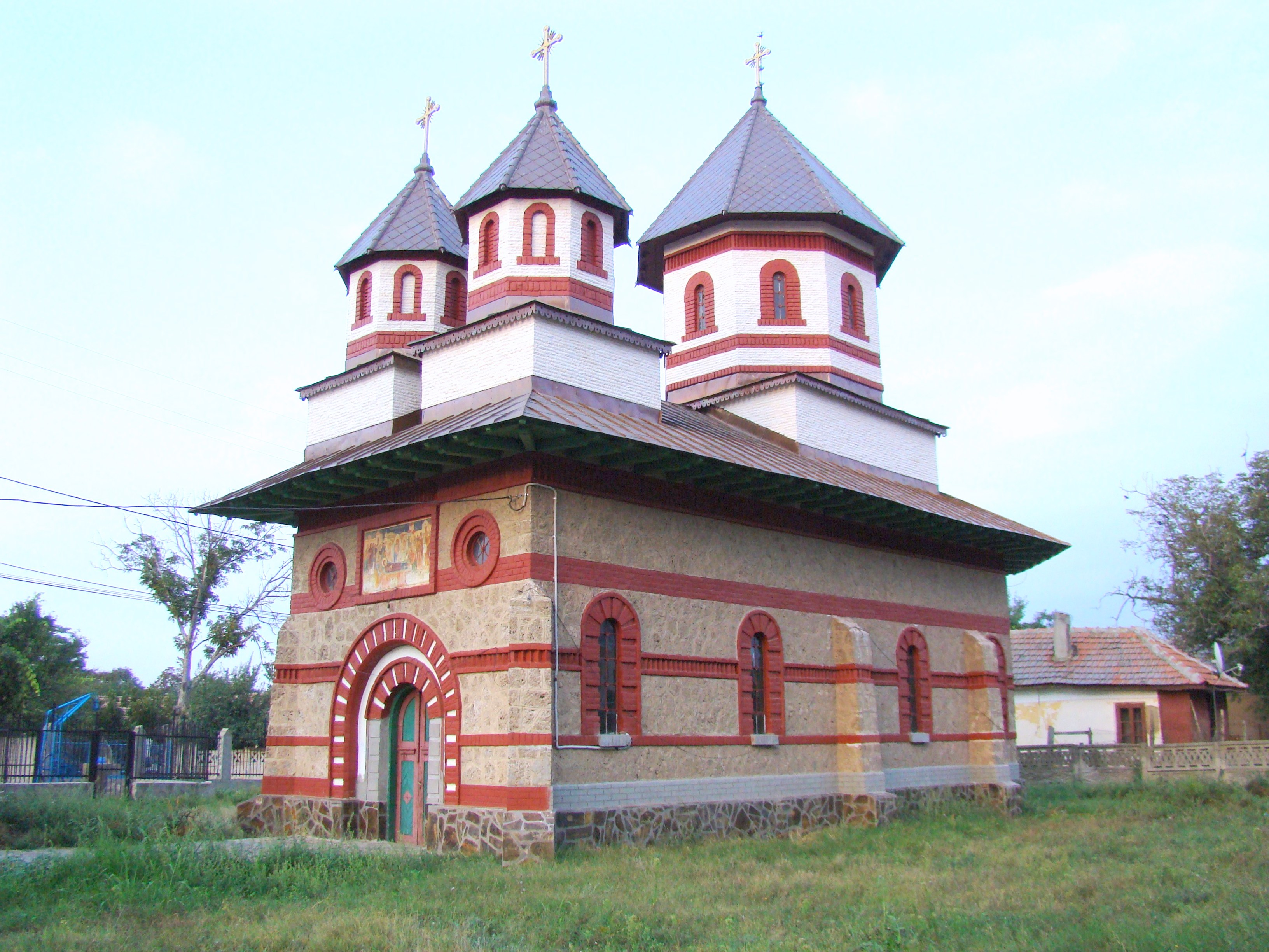 Biserica ortodoxă din Gruia, județul Mehedinți